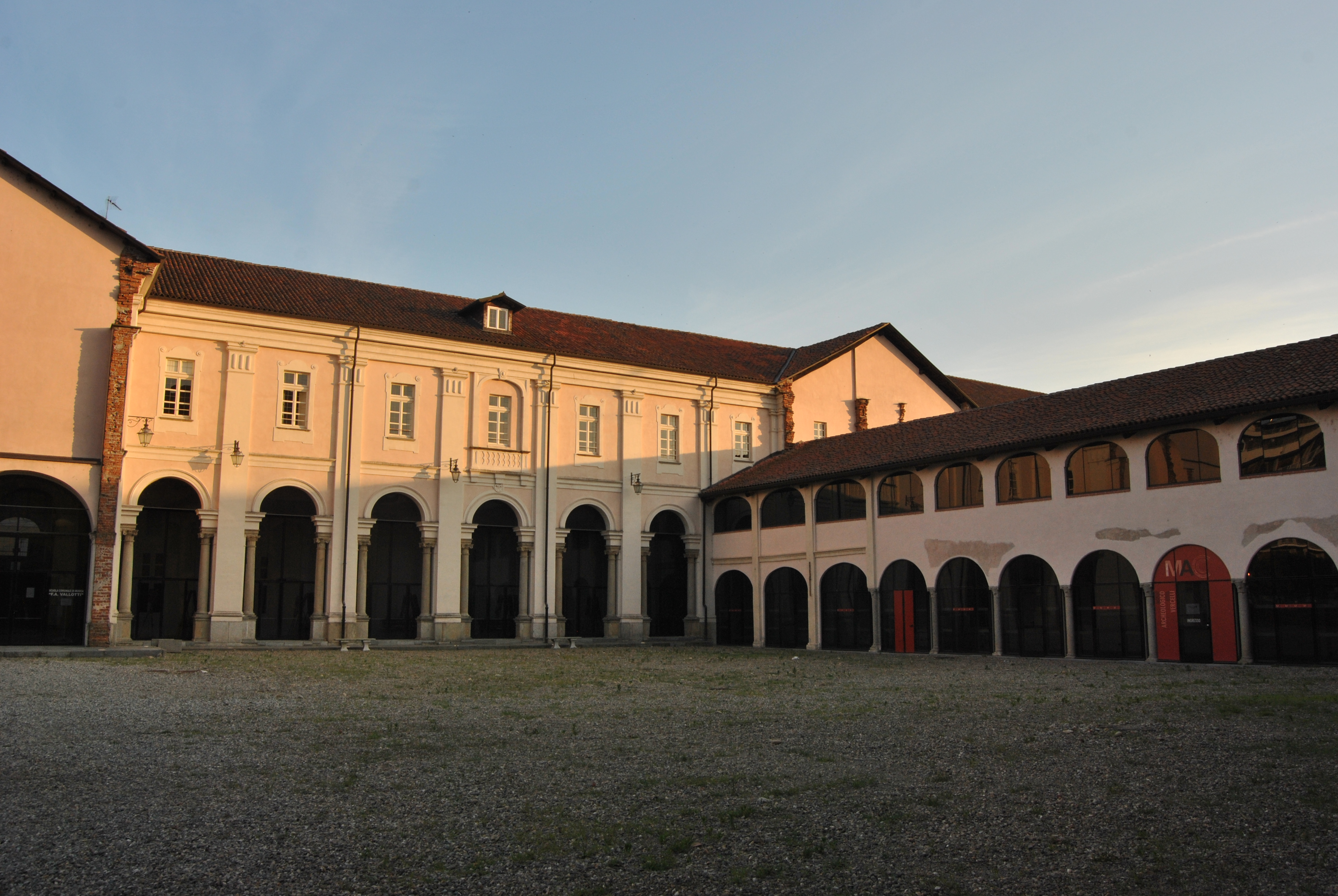 chiostro santa chiara lato ballotti